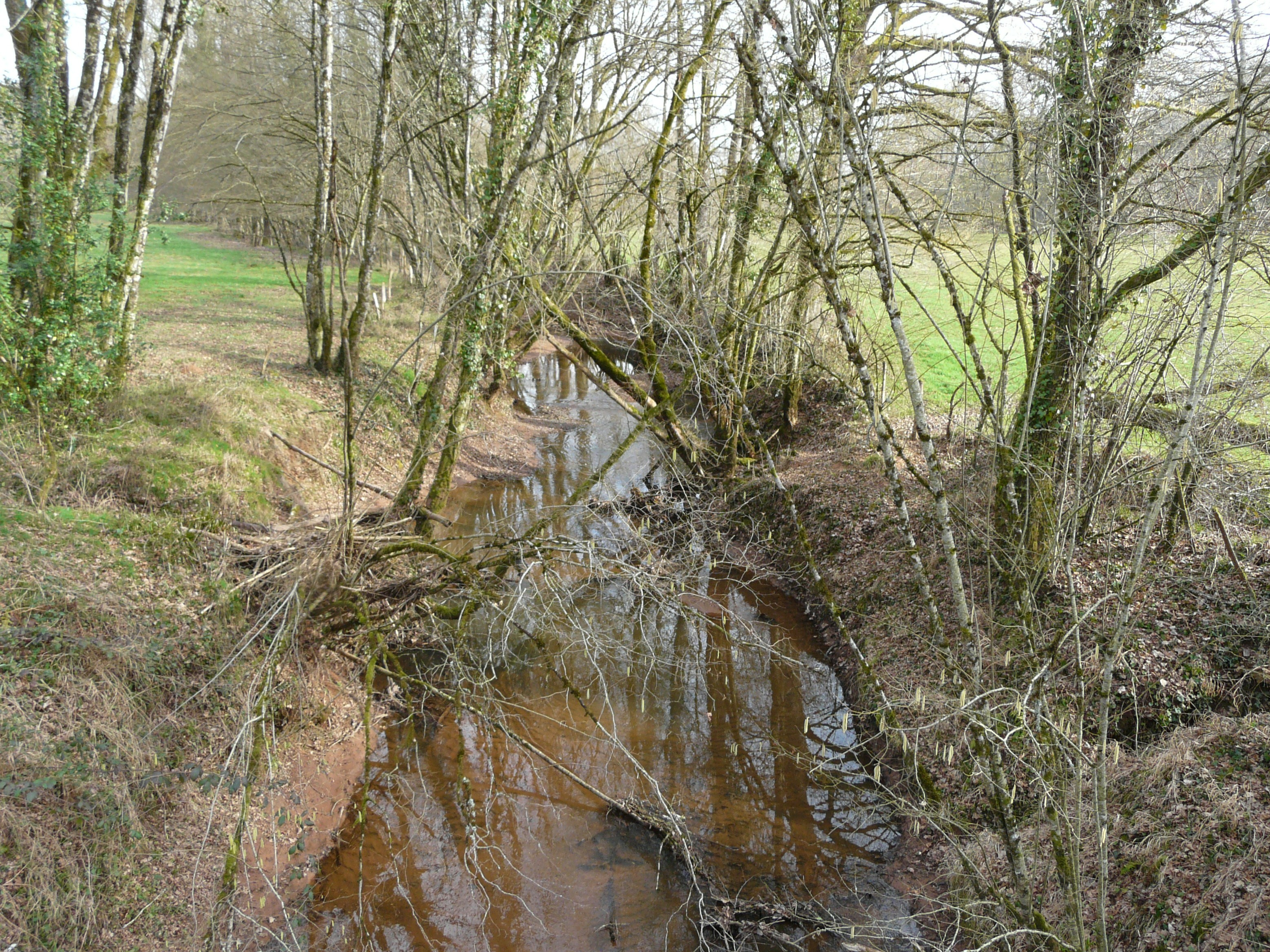 Le Dalon en amont du pu pont de la route départementale 72, en limites de Sainte-Trie (à gauche) et Boisseuilh (à droite), Dordogne, France.